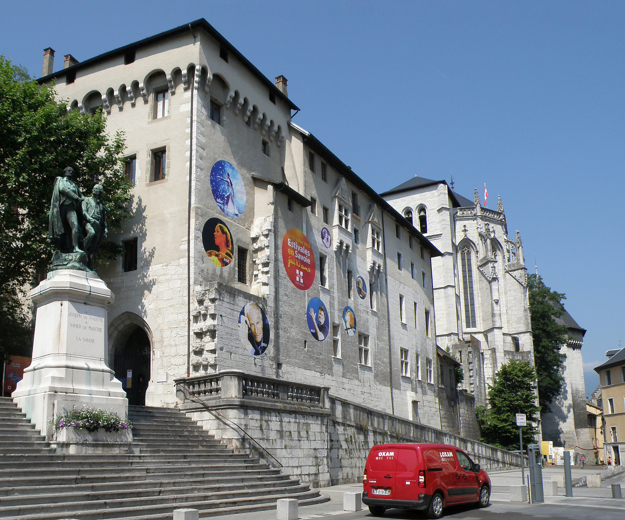 Chambéry, ville et préfecture du département de la Savoie (région Rhône-Alpes, France). Château, vu depuis la place du Château.